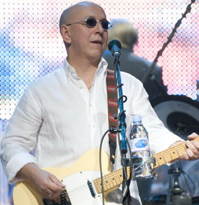 На 30-летии группы «Воскресение» в ГЦКЗ«Россия» в сентябре 2009 года